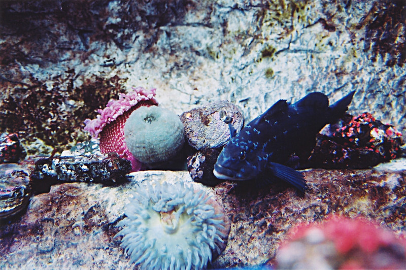 Scène sous-marine au Parc aquarium du Québec (ville de Québec, Québec, Canada); Underwater scene at the Parc aquarium du Québec (Quebec city, Quebec, Canada)